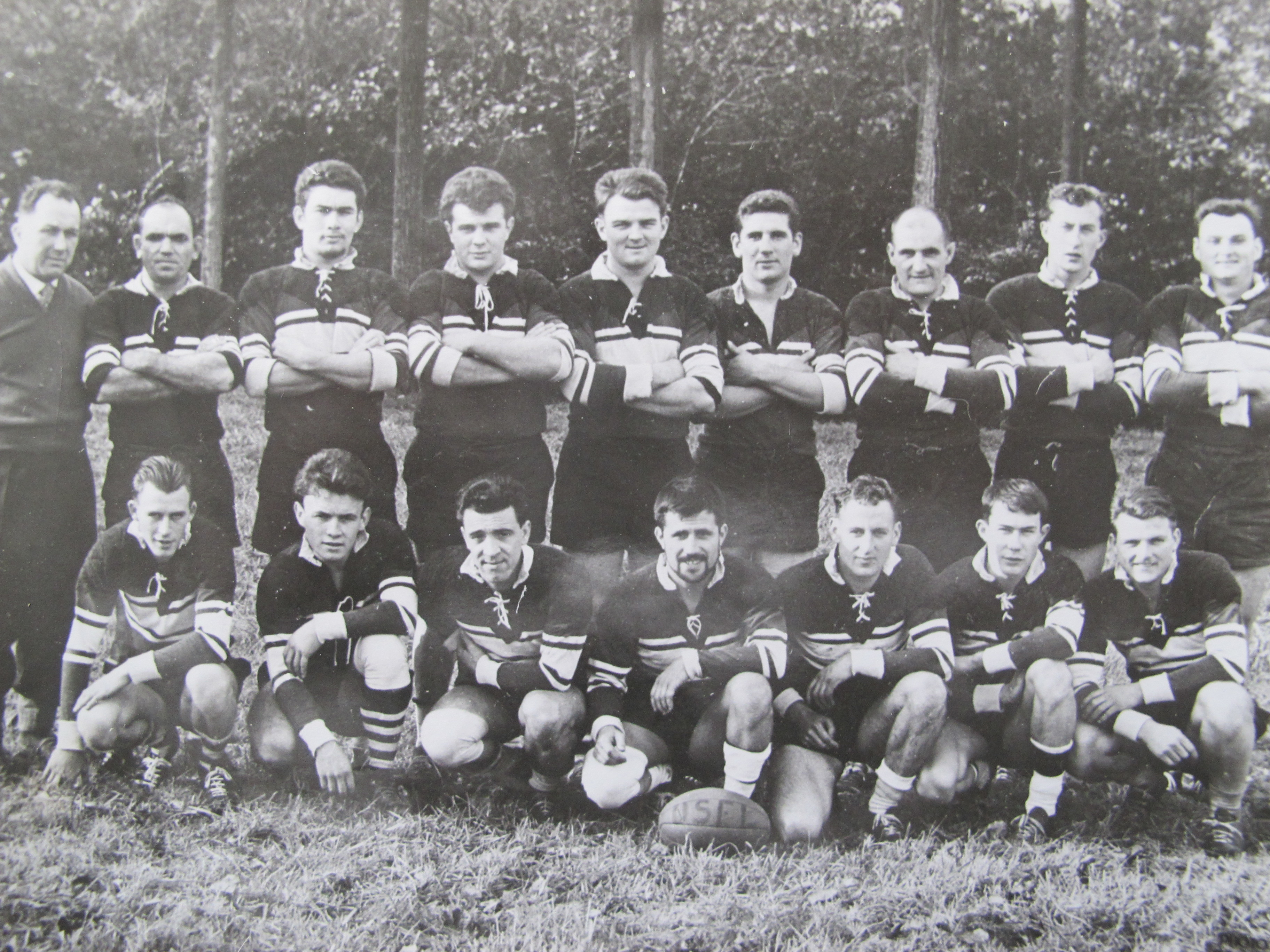 Equipe USFL Fin des années 50